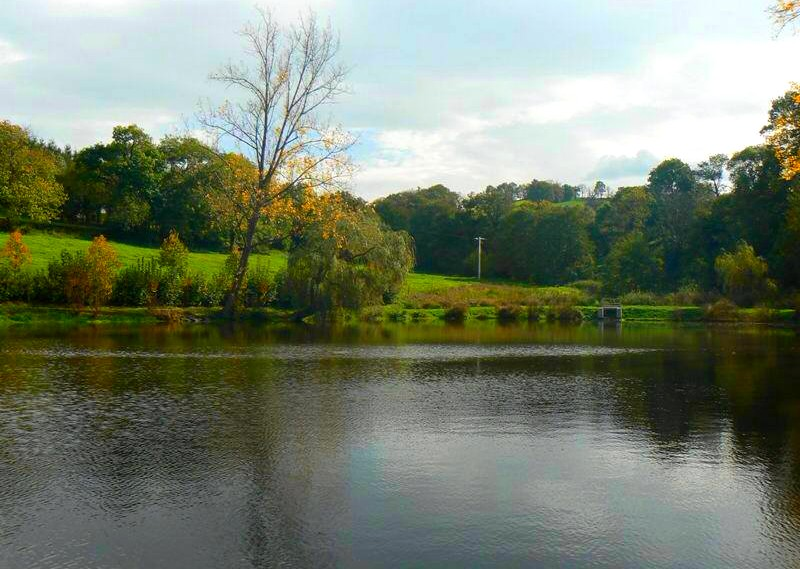 Barrage de Saint-Héand.